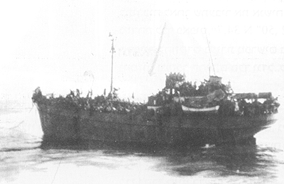 אוניית המעפילים כ"ג יורדי הסירה